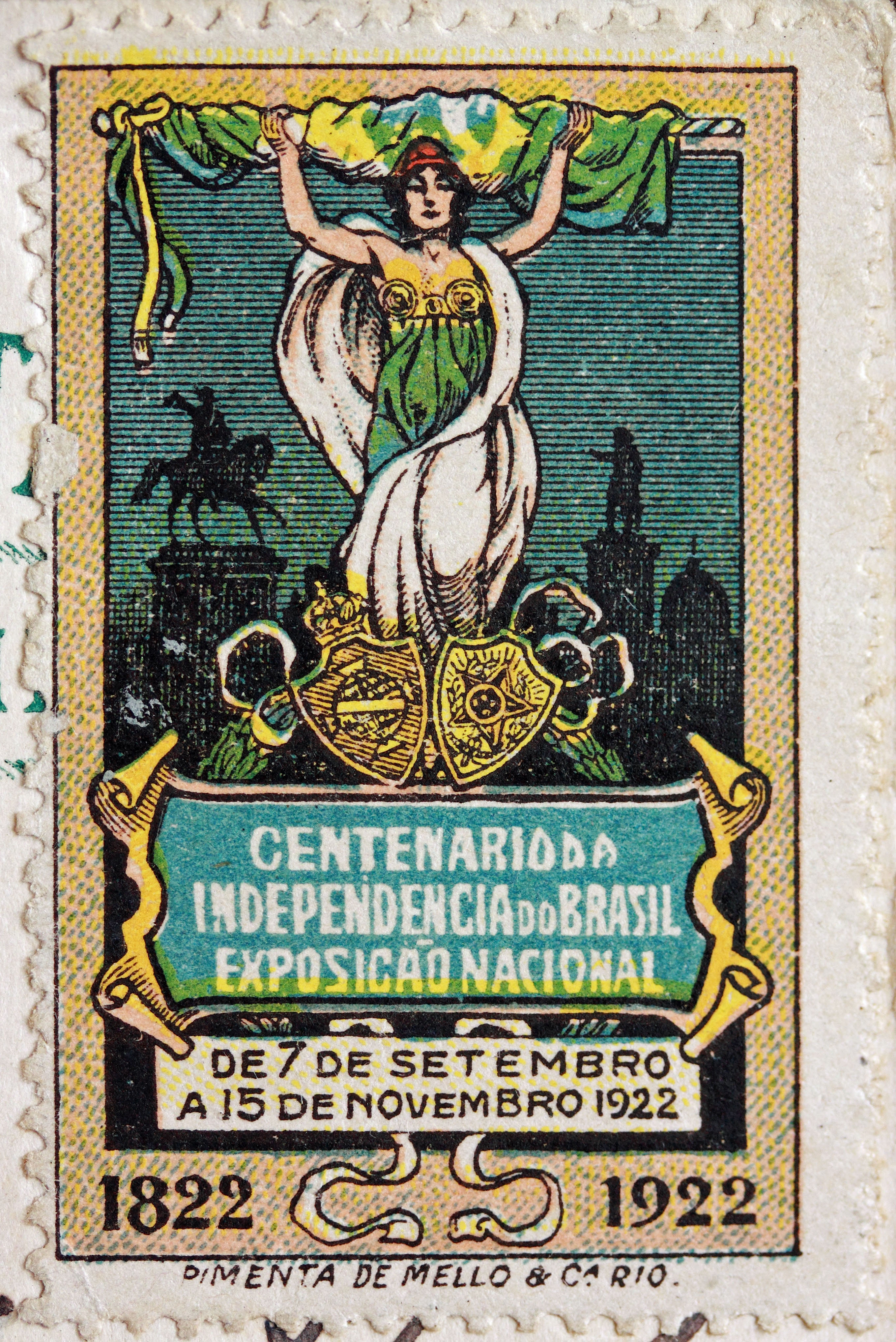 Centenário da Independência do Brasil - Exposição Nacional - De 7 de setembro a 15 de novembro de 1922 - 1822-1922 - Selo Comemorativo